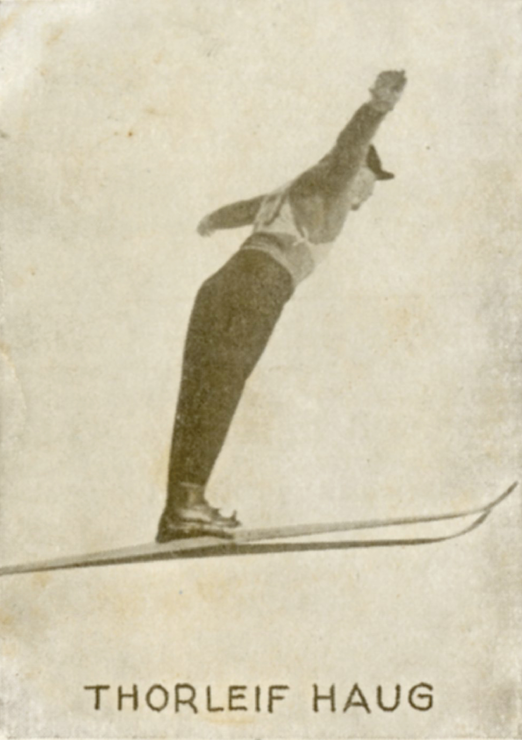 Format: Samlekort Dato / Date: ca. 1930 (dokumentet) Fotograf / Photographer: Ukjent Wikipedia: Thorleif Haug (1894 - 1934) Eier / Owner Institution: Trondheim byarkiv, The Municipal Archives of Trondheim Arkivreferanse / Archive reference: Sportsklubben Freidig: Sigarettfoto ca. 1930 (Løpenr. 75) F23978 Tekst på baksiden: Thorleif Haug, vor anden store skikonge og kanske mest populære norske idrætsmand. Han har utallige store seire i 50 km. langrend. Kongepokaler i kombinert rend o.s.v. Han har beseiret finner og svensker mange ganger og blev dobbeltvinder i Vinterolympiaden i Chamonix 1924. Deltar nu som senior. Merknad: Disse samlekortene med bilder av norske og internasjonale idretthelter fulgte med i sigarettpakker på 1920 og 30-tallet - derav tobakksreklamen på baksiden. Samlekortene kommer fra Sportsklubben Freidigs arkiv, og inneholder nærmere 90 unike kort pent plassert i et samlealbum. Samleren var den senere skipsmegler Finn Følling (1914 – 1985).